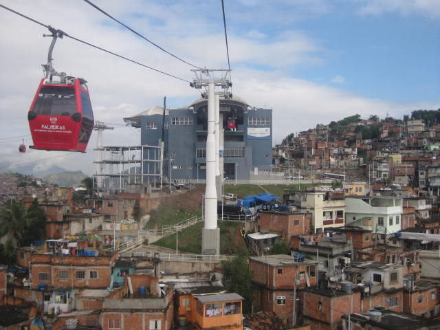 Fotos tiradas na saída fotográfica no Complexo do Alemão